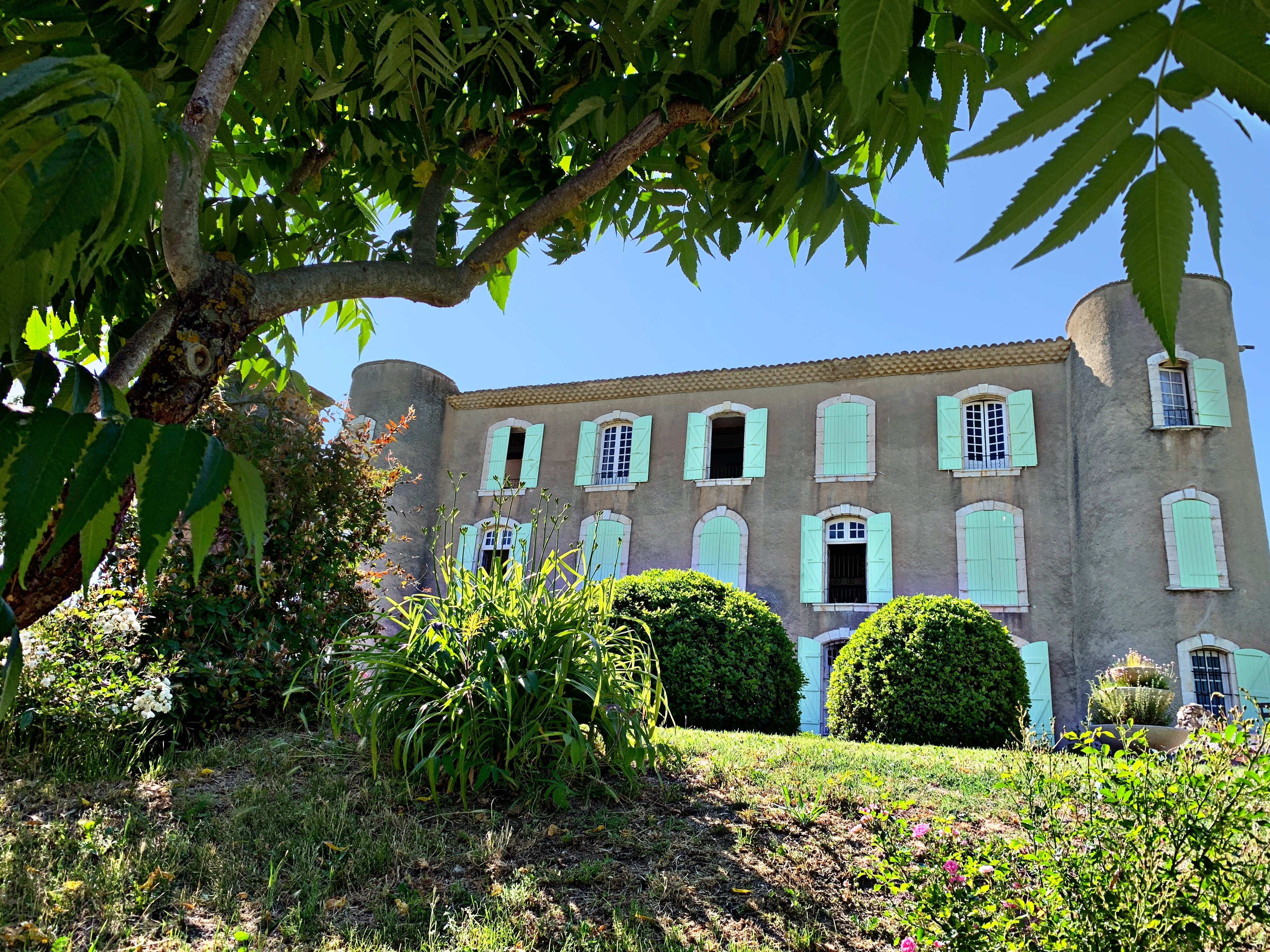 Le Château est une propriété privé. Il est un élément central du village de Saint-Laurent-Du-Verdon.